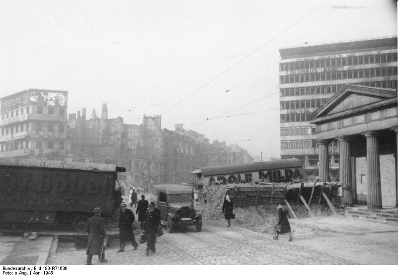 Berlin, Panzersperre am Potsdamer Platz ADN-ZB/Archiv Das faschistische Deutschland im II. Weltkrieg 1939-45 Berlin wird am 1. Februar 1945 zum "Verteidigungsbereich" erklärt. Barrikaden werden errichtet, Stellungen und Panzergräben ausgehoben. Blick auf eine Panzersperre am Potsdamer Platz, Anfang April 1945. [Scherl Bilderdienst] Information added by Wikimedia users.